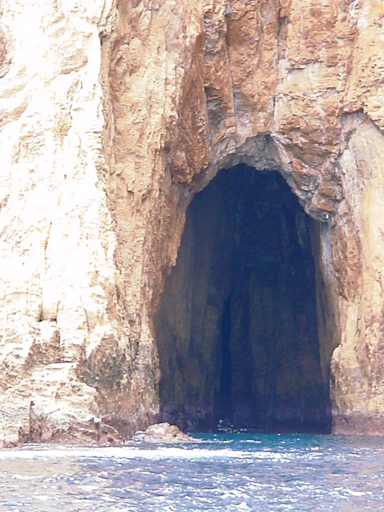 Gruta Bela Azul, Ilhéus das Cabras, ilha Terceira, Açores, Portugal.